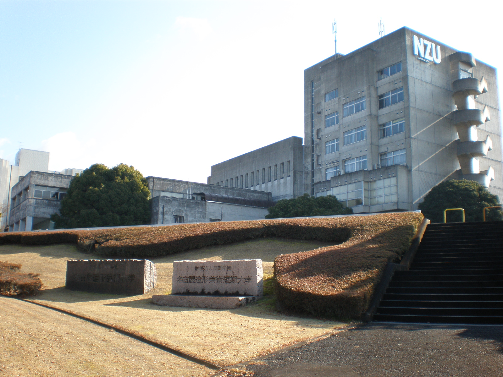 愛知県小牧市にある名古屋造形大学